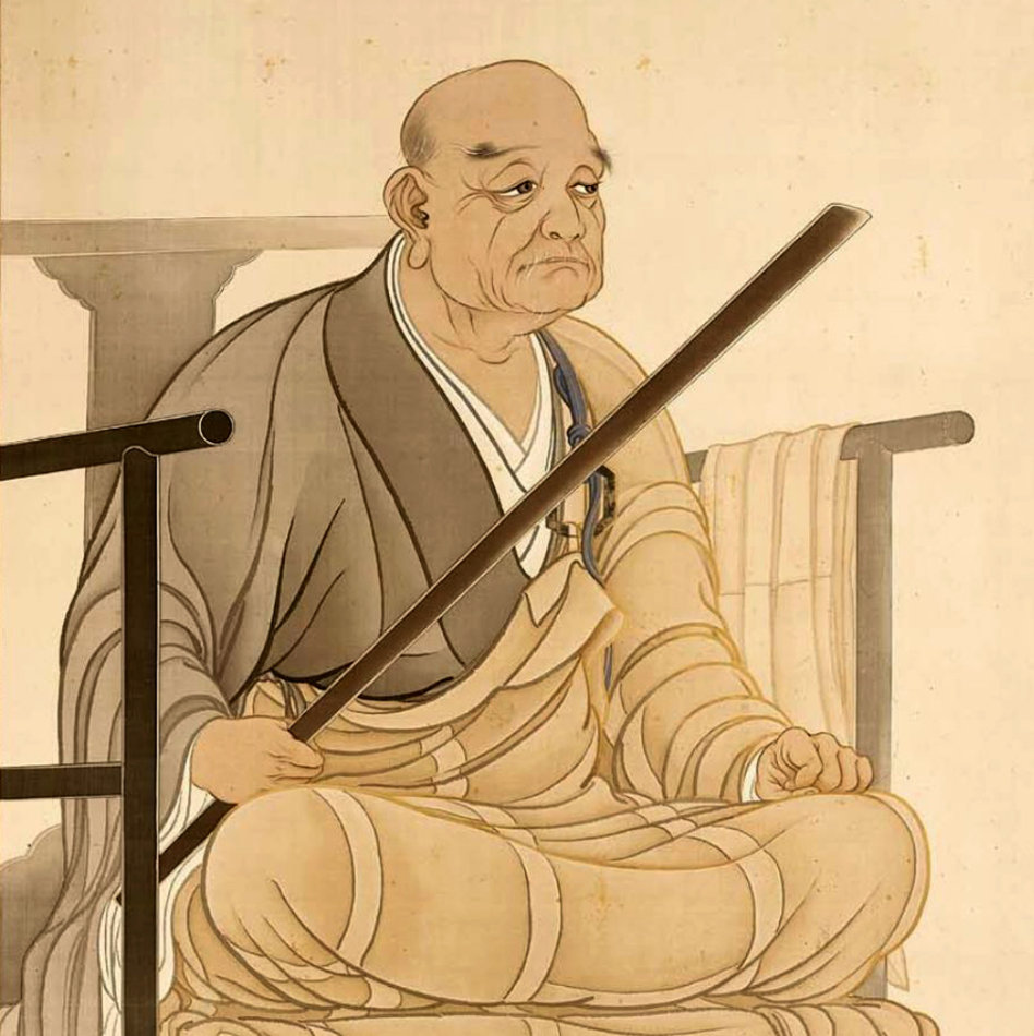 掛軸絹本設色，159.7 x 84.7厘米 說明 : 作者經考據禪宗公案，描繪出“當頭棒喝”的坐姿；圖中人物應為馬祖道一。